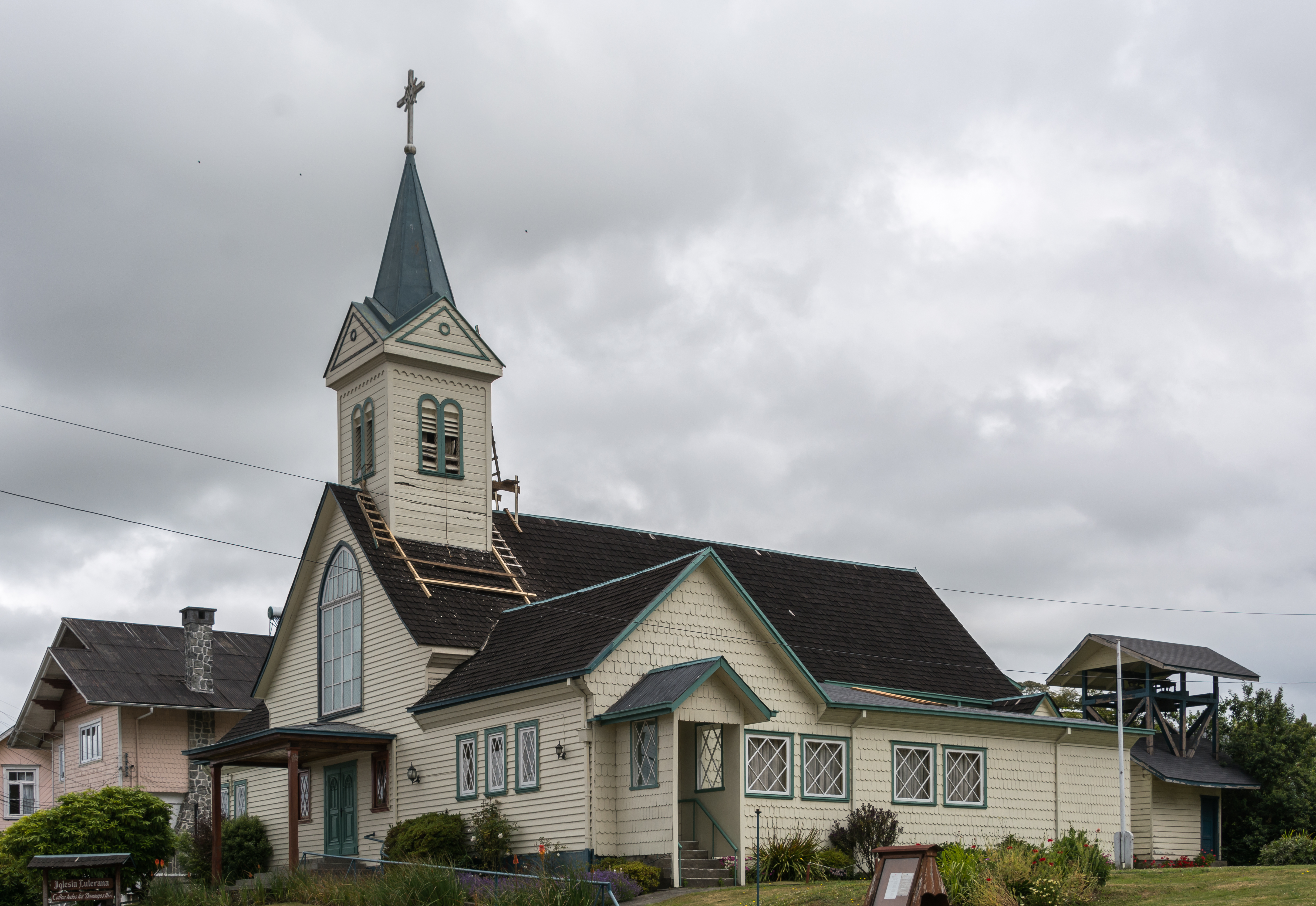 Templo luterano de Frutillar, Frutillar, Región de Los Lagos, Chile.